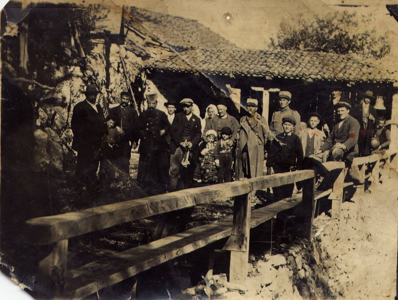 Спасовден 1927 година. Св. Спас Горни, Вевчани